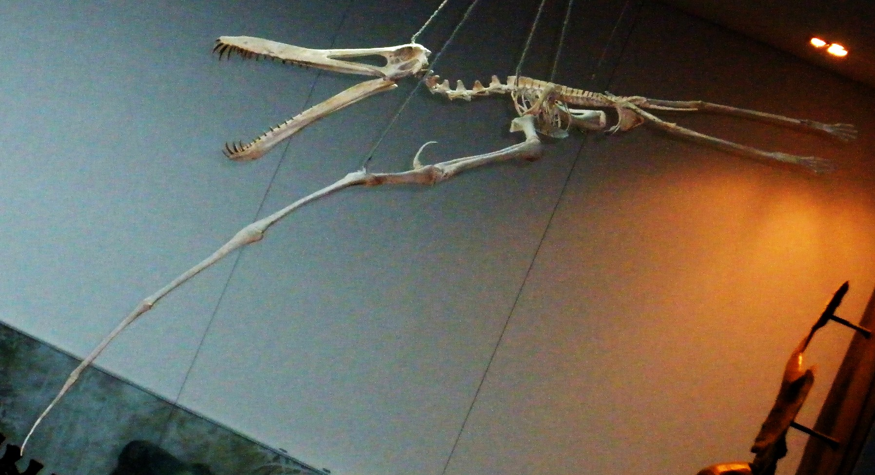 Fossil of Anhanguera, an extinct pterosaur- Took the photo at Senckenberg Museum of Frankfurt